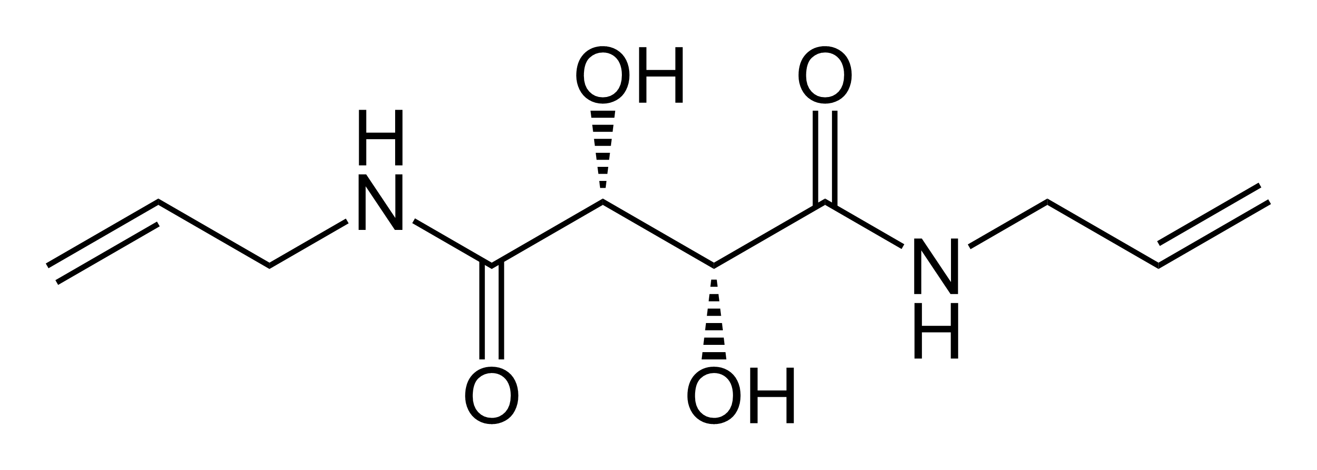 Chemische Formel von N,N'-Diallyltartardiamid